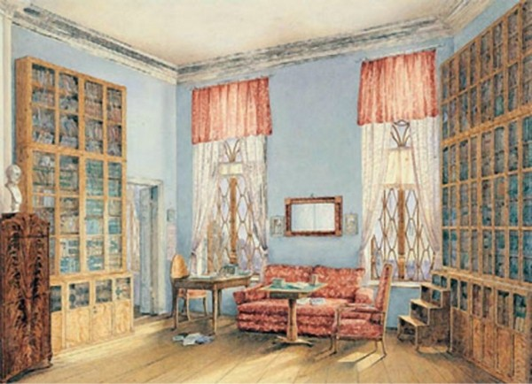 Библиотека в готическом доме Авчурино. Акварель Ш. Ребу, 1846 г.